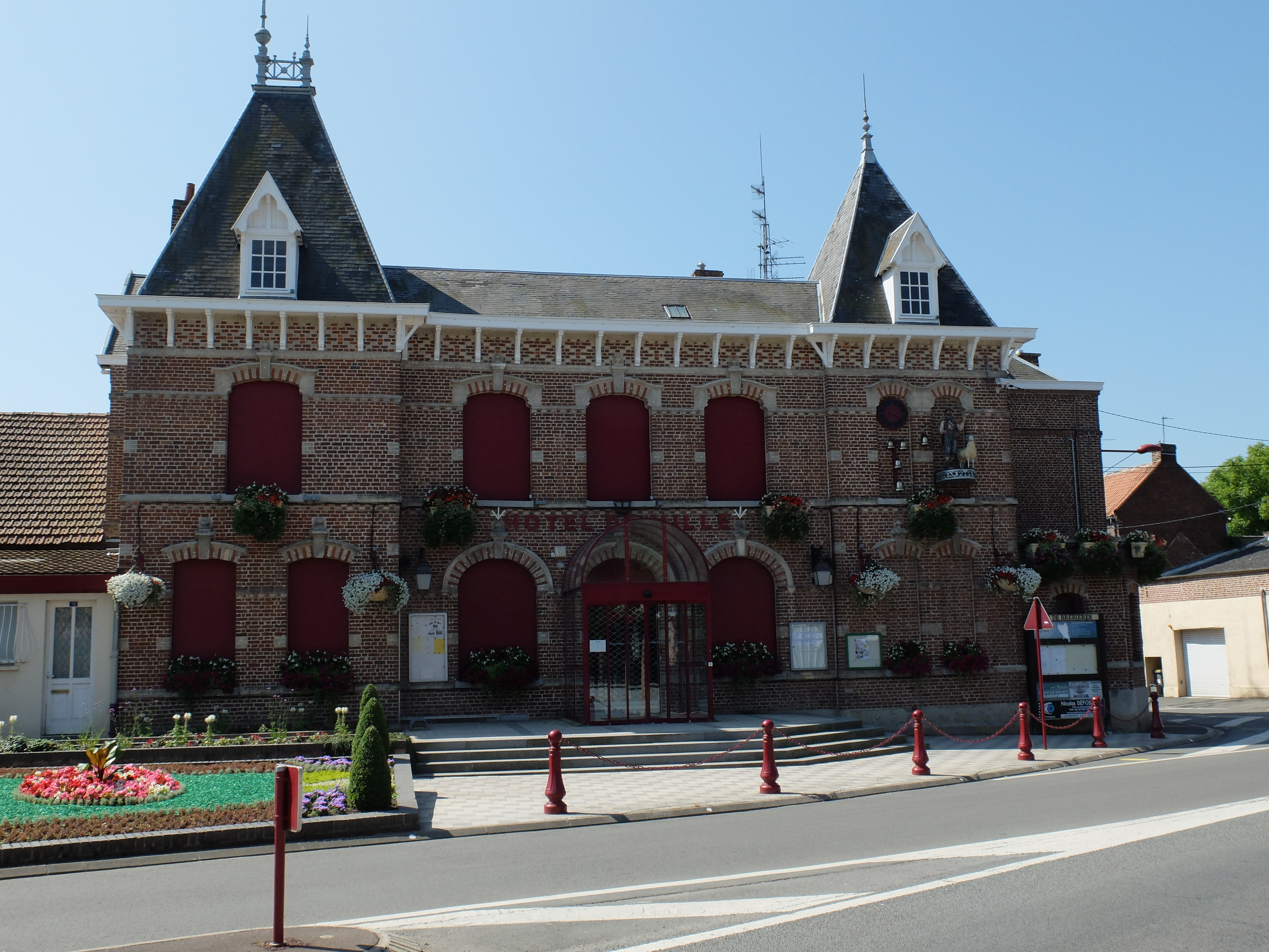 Vue de la mairie de Brebières.